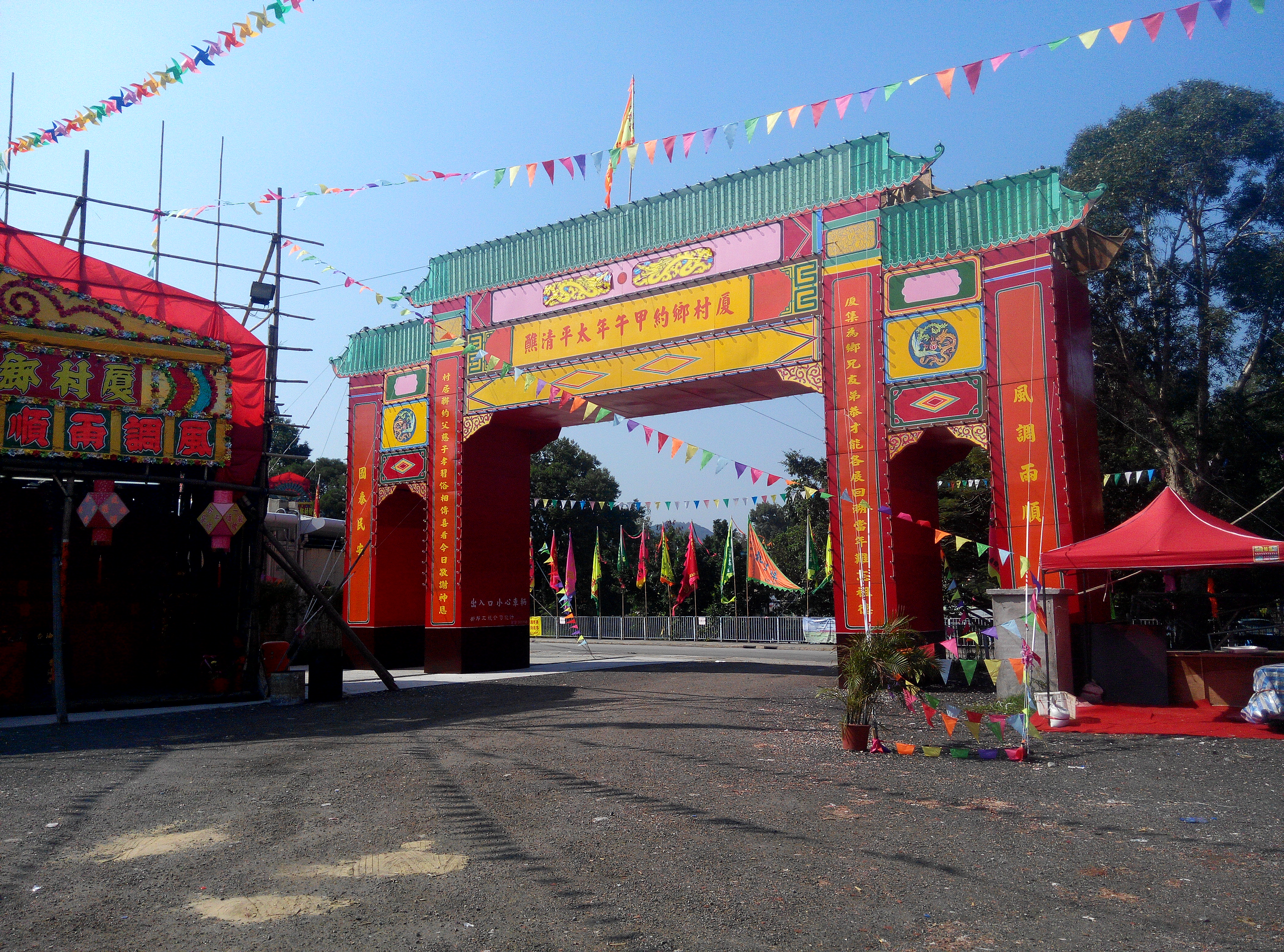 廈村鄉約甲午太平清醮醮場門樓